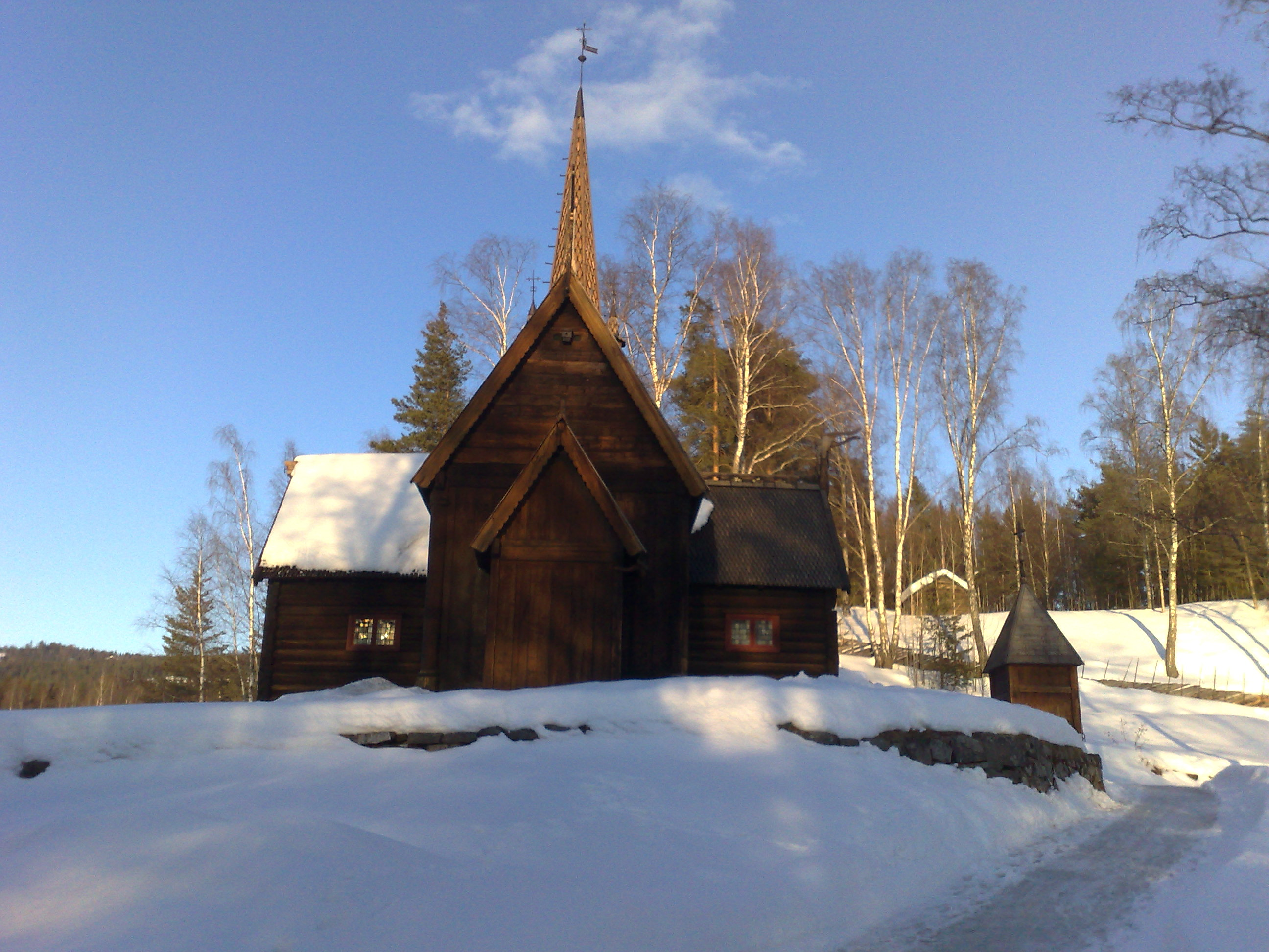 Garmo stavkyrkje på Maihaugen, Lillehammer